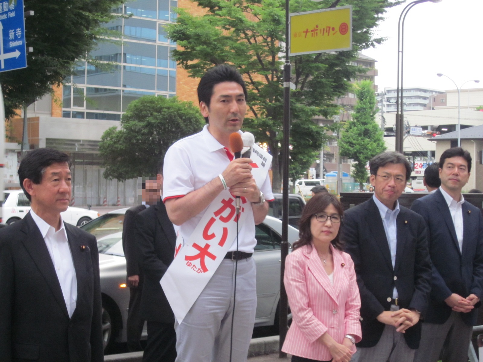 伊藤信太郎、熊谷大、稲田朋美、秋葉賢也、愛知治郎。2016年6月22日、第24回参議院議員選挙宮城選挙区街頭演説にて。